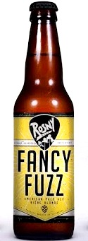 Bouteille de bière Fancy Fuzz, de la brasserie Rosny, en France.